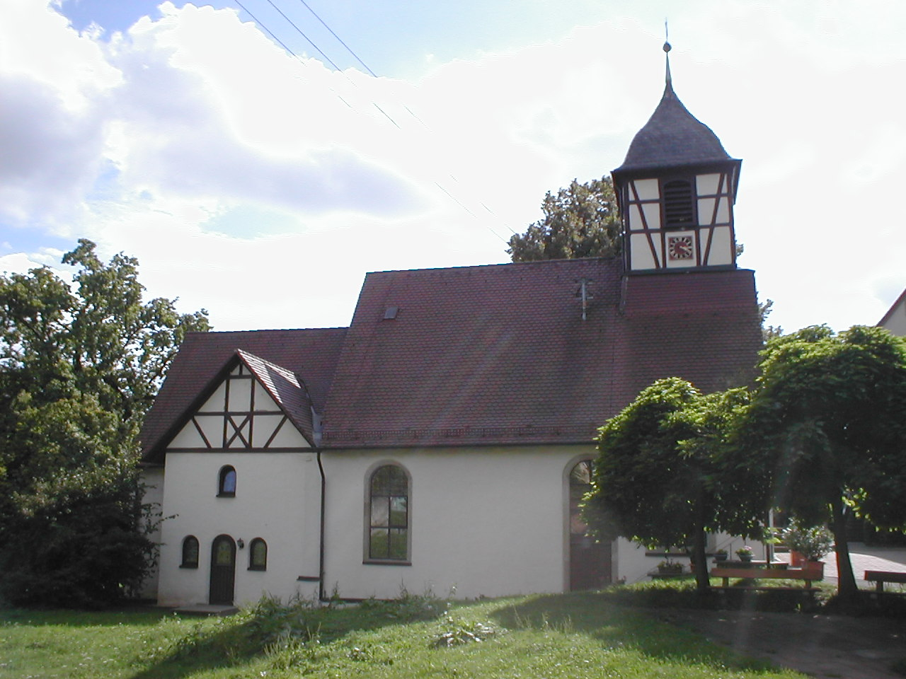 Evangelische Kirche in Klingenberg, renoviert 1736